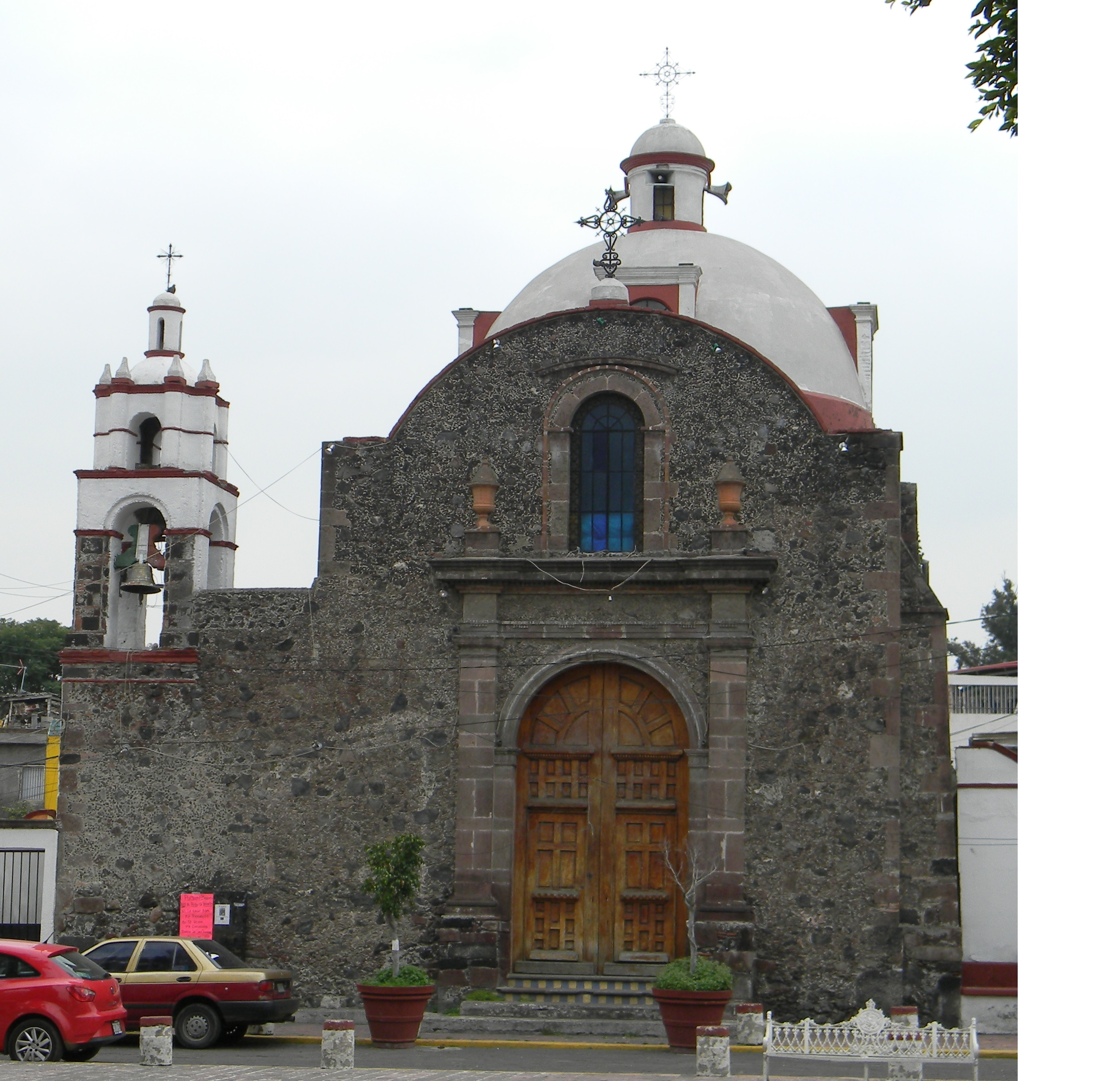 Vista de la fachada de la Capilla de San Cristóbal, la cual consistía en un pequeño salón de 6 metros hasta que en el siglo XIX fue reconstruida para quedar como lo que es en la actualidad. Se encuentra en el Barrio de San Cristóbal Xallan, Xochimilco, Ciudad de México.